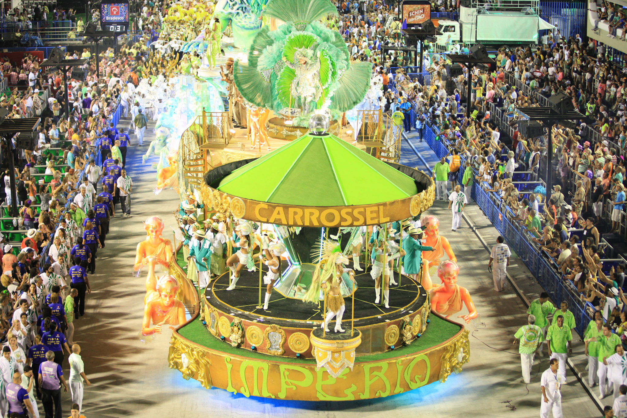 Rio de Janeiro - Primeiro dia de desfile das escolas de samba da Série A, antigo Grupo de Acesso, na Sapucai. (Raphael David/Agência Brasil)